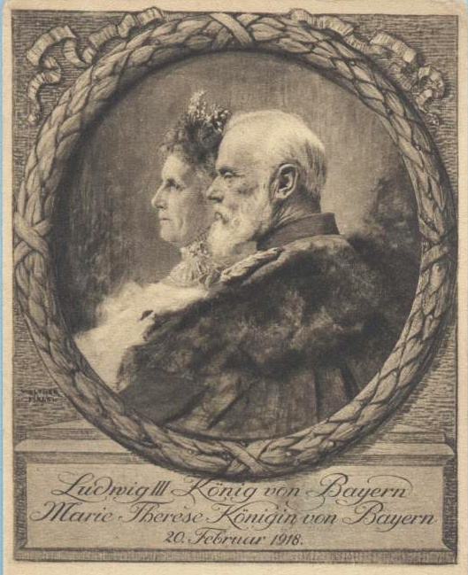 König Ludwig III. und Königin Marie Therese von Bayern, offizielles Portät zur Goldenen Hochzeit 1918, von Walter Firle (1859-1929)